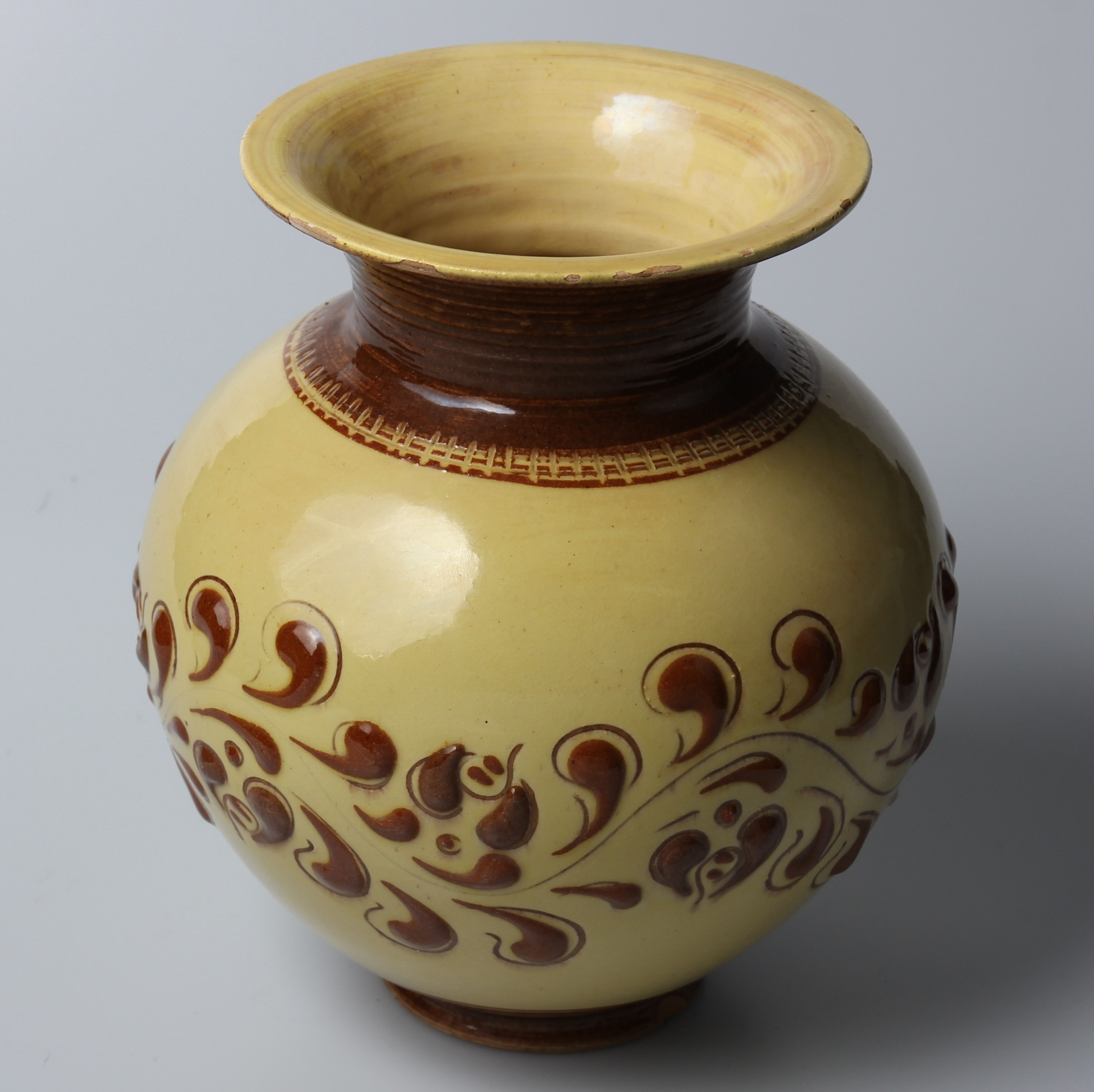 Vase, Tellingstedter Keramik